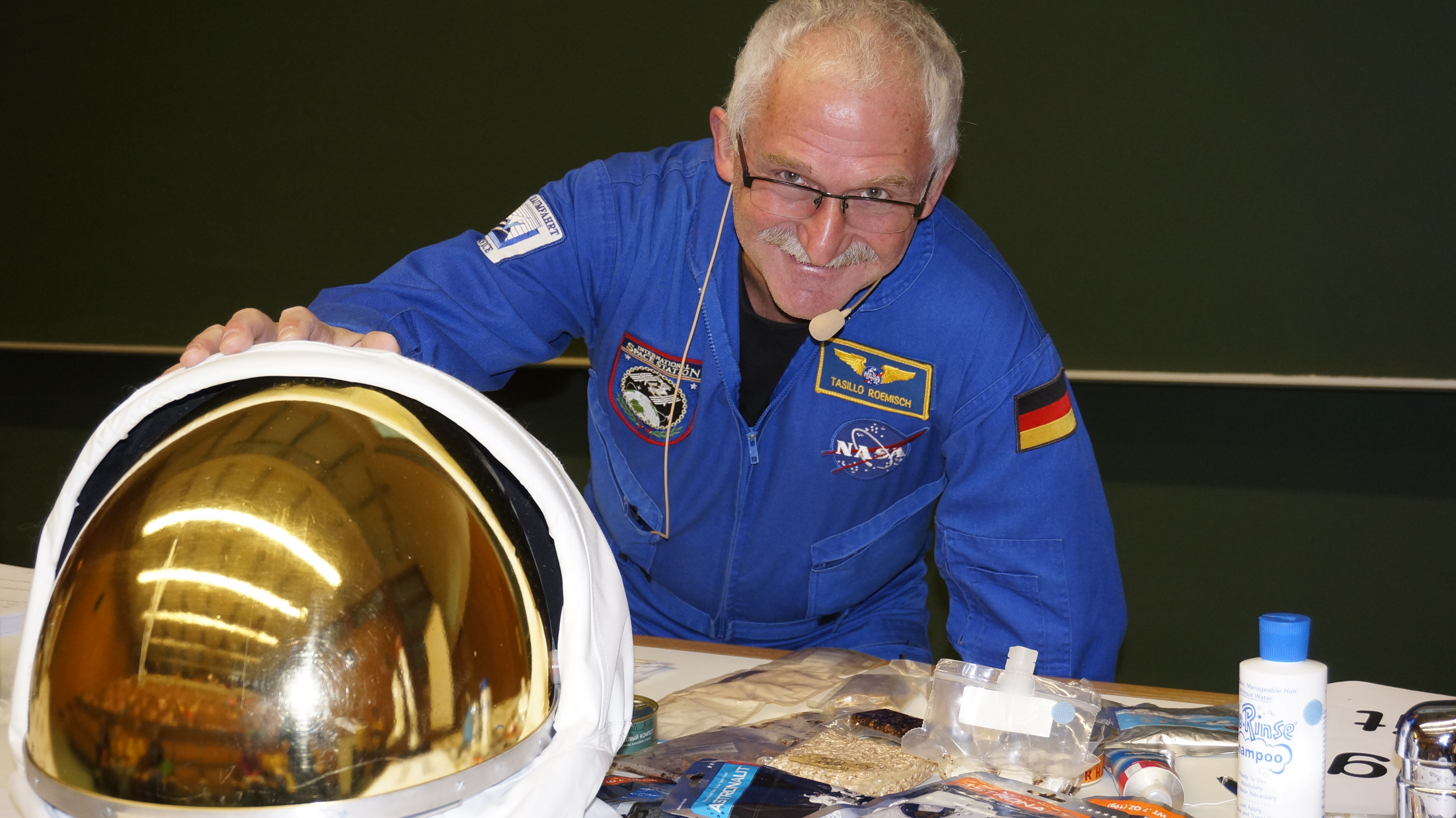 In der Kinderuni- Vorlesungsreihe der Hochschule Mittweida macht Dipl.-Ök. Tasillo Römisch "Astronautenausbildung" mit den jungen Hörern. Er zeigt auch Raumanzüge und Weltraumnahrung.